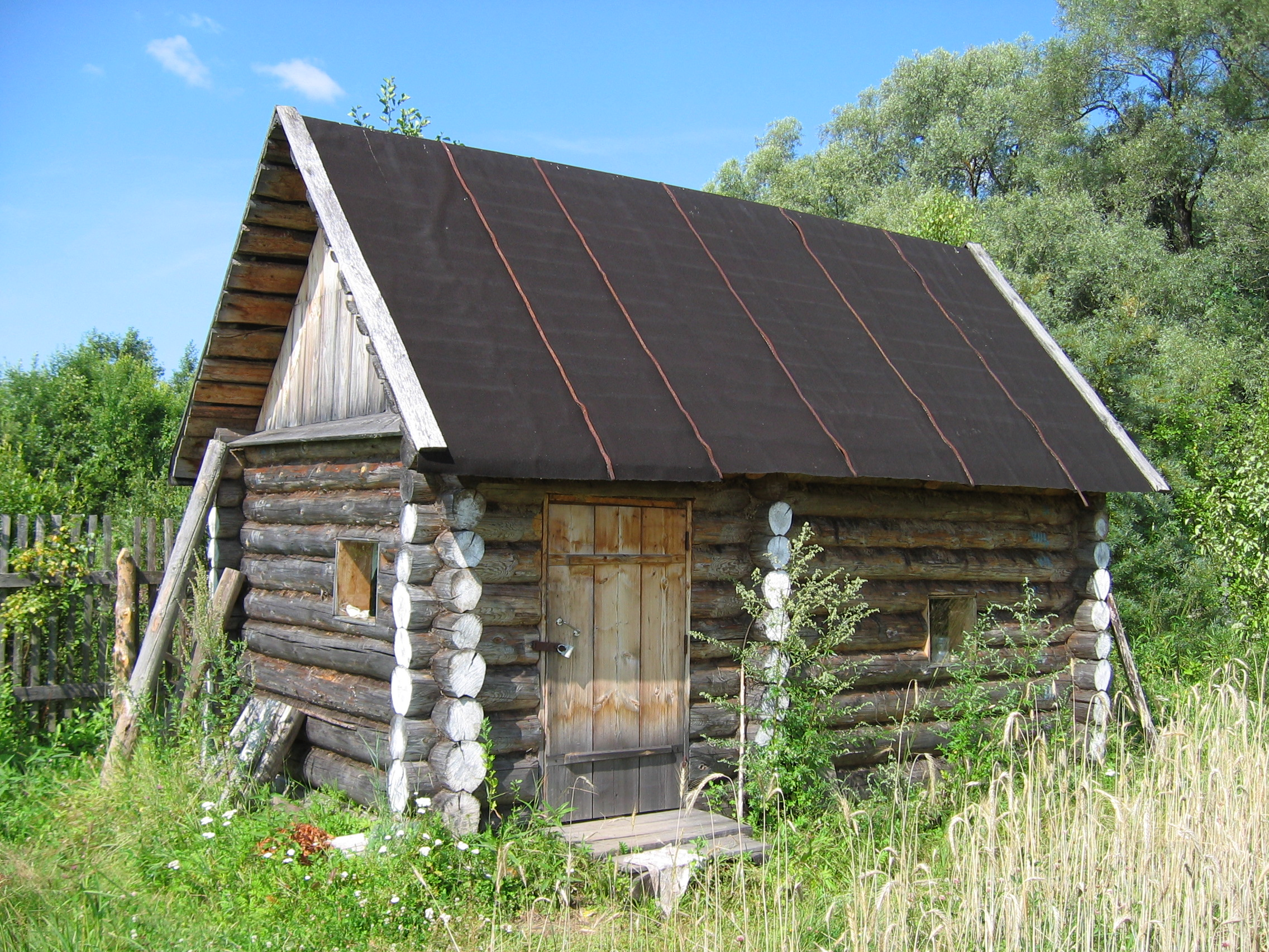 Eine russische Banja aus der Datschenkolonie der Siedlung Par Ort: Parfino/ Novgorodskaja Oblast/Russische FÃ¶deration